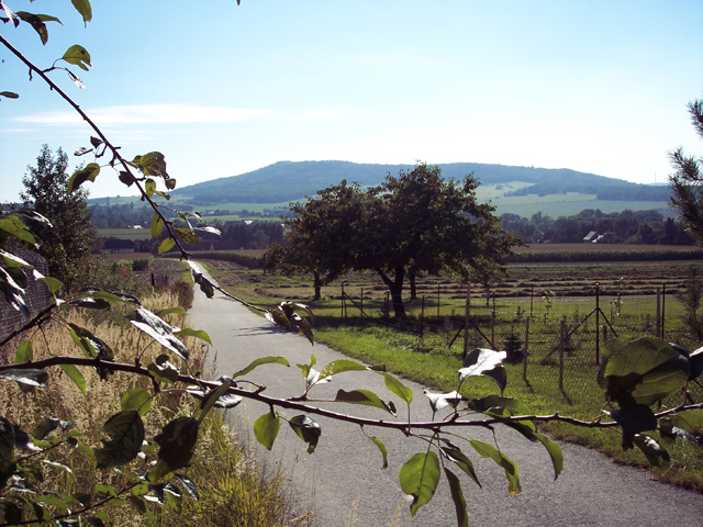 Blick von Niedersohland auf den Sohländer Hausberg Rotstein